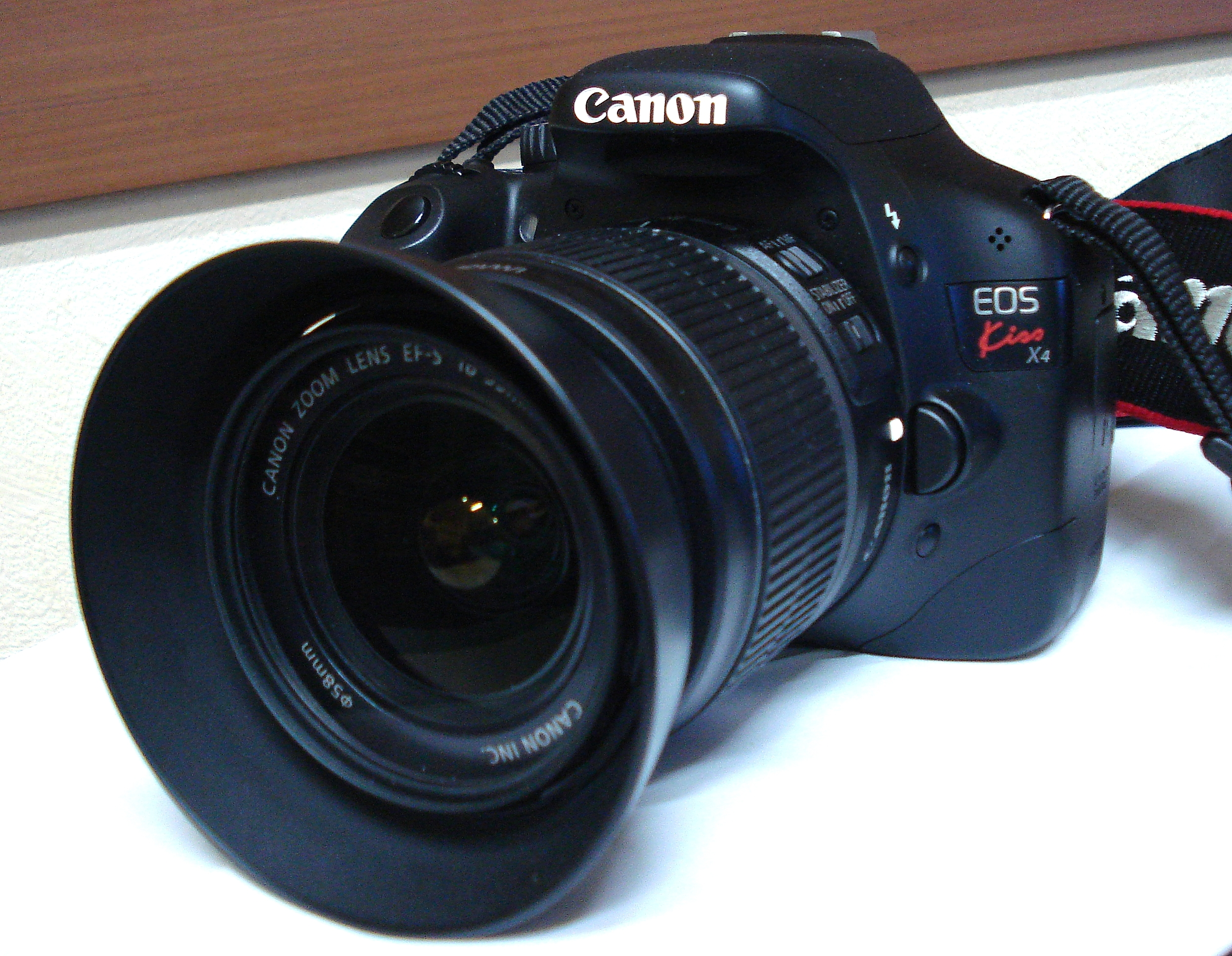 EOS 550D(Japanese model) & EF-S18-55mm F3.5-5.6 IS